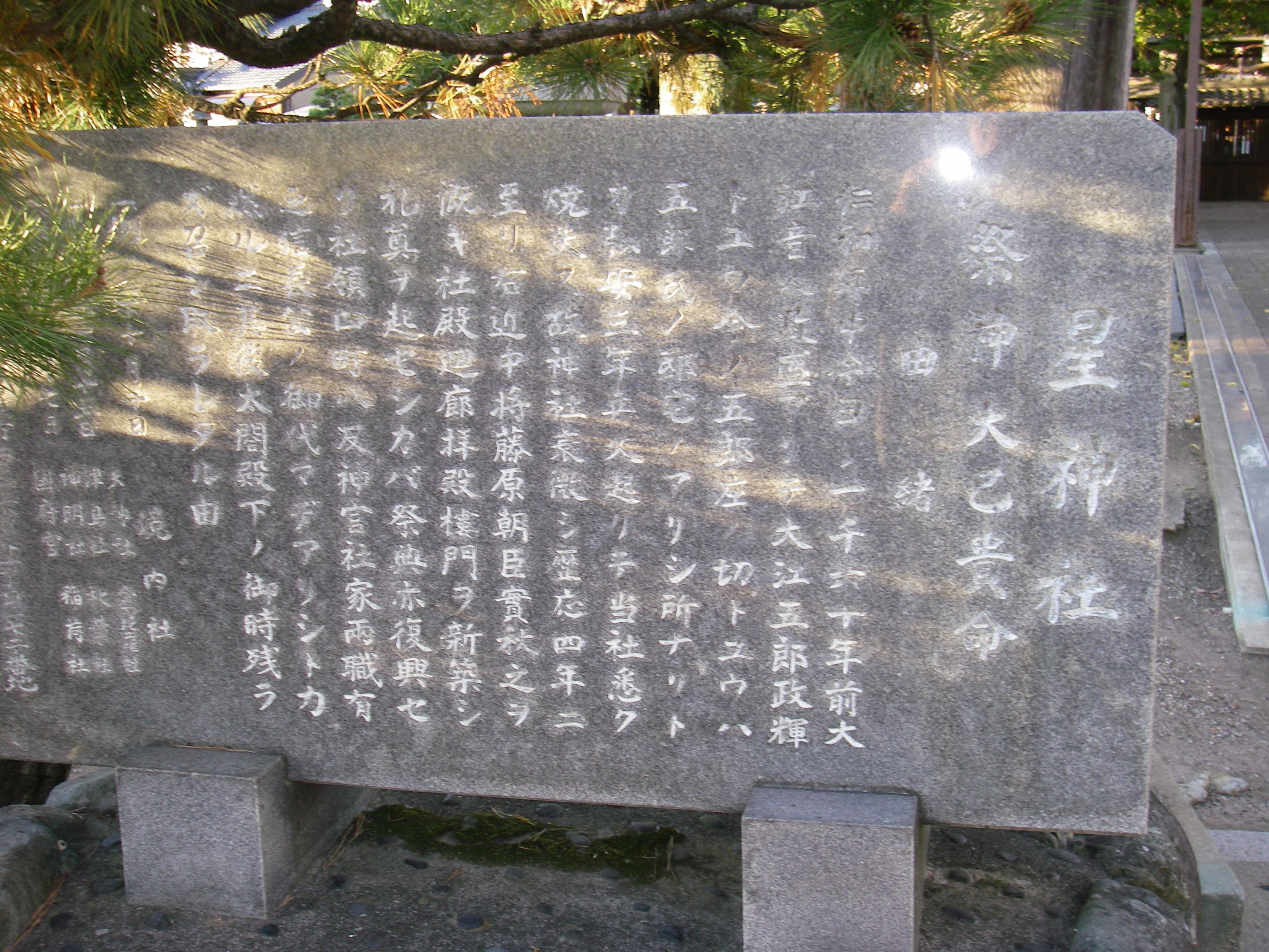 星神社（名古屋市西区）の石碑。